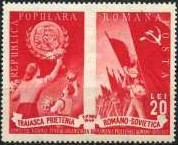 Румынская марка с вождями коммунизма